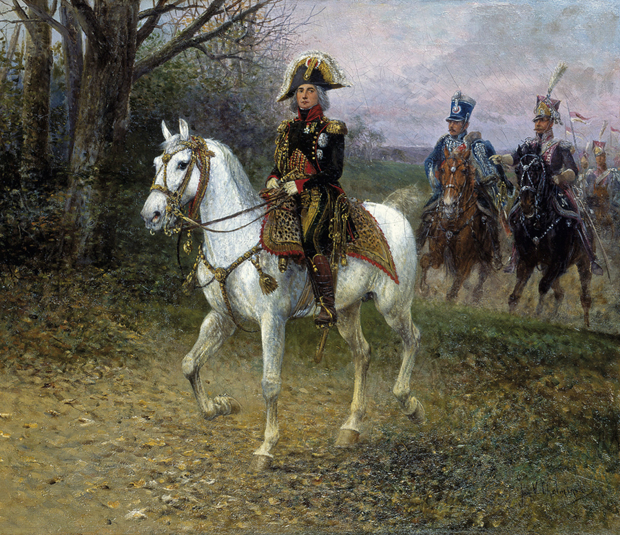 Le maréchal Bessières, duc d'Istrie, et son escorte de lanciers polonais de la Garde en 1813.